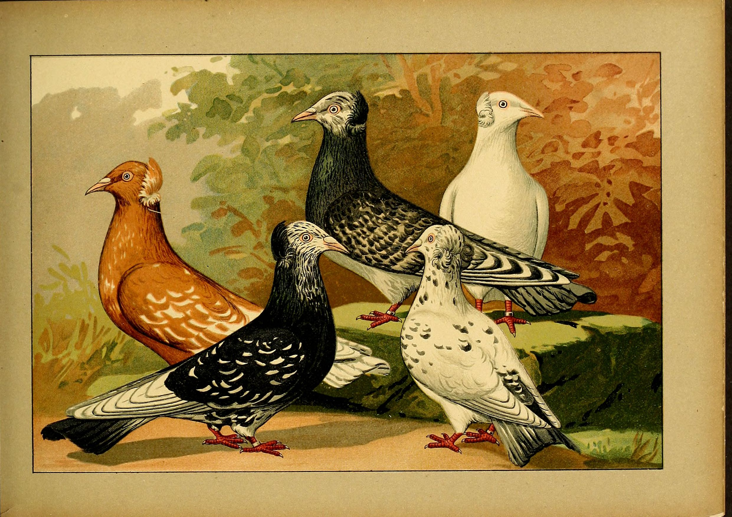 Deutsch